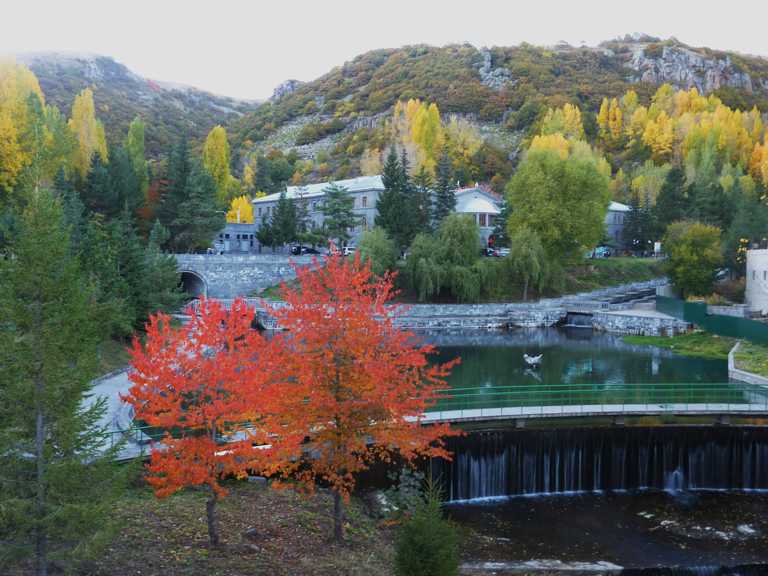 La station thermale de Djermouk : paysage et petit lac